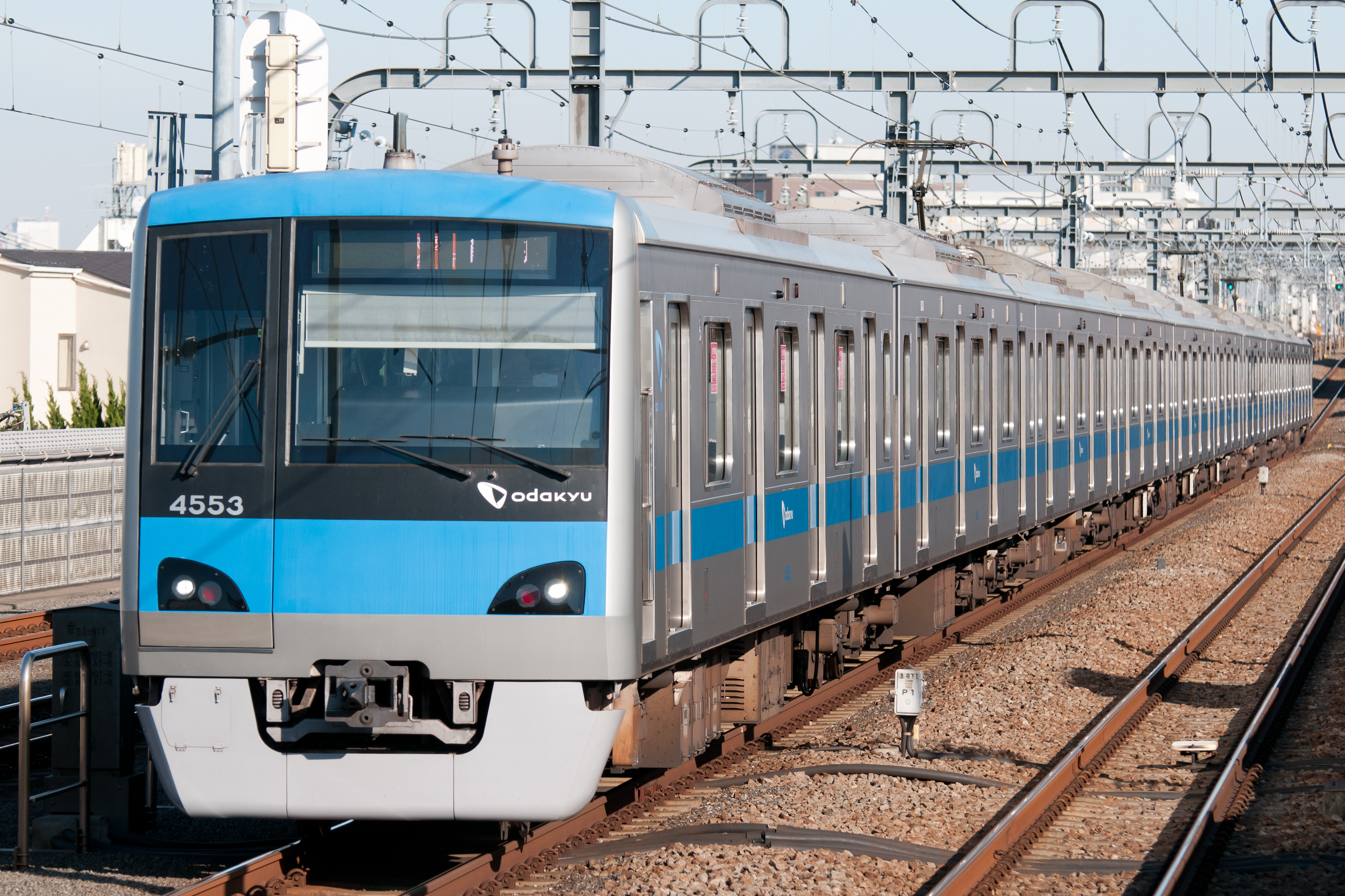 小田急4000形。